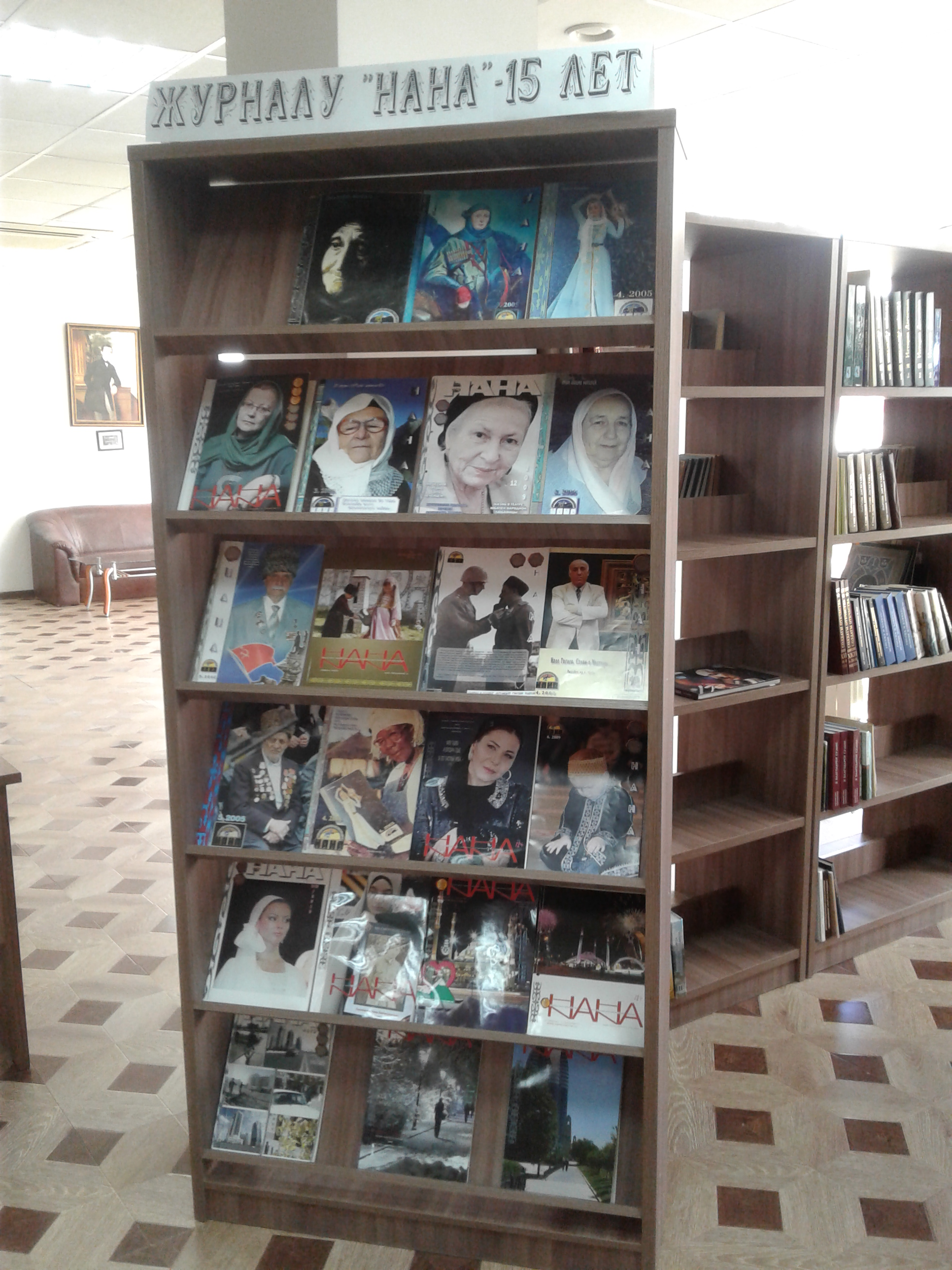 Выставка, посвященная 15-летию журнала Нана, в Национальной библиотеке Чечни